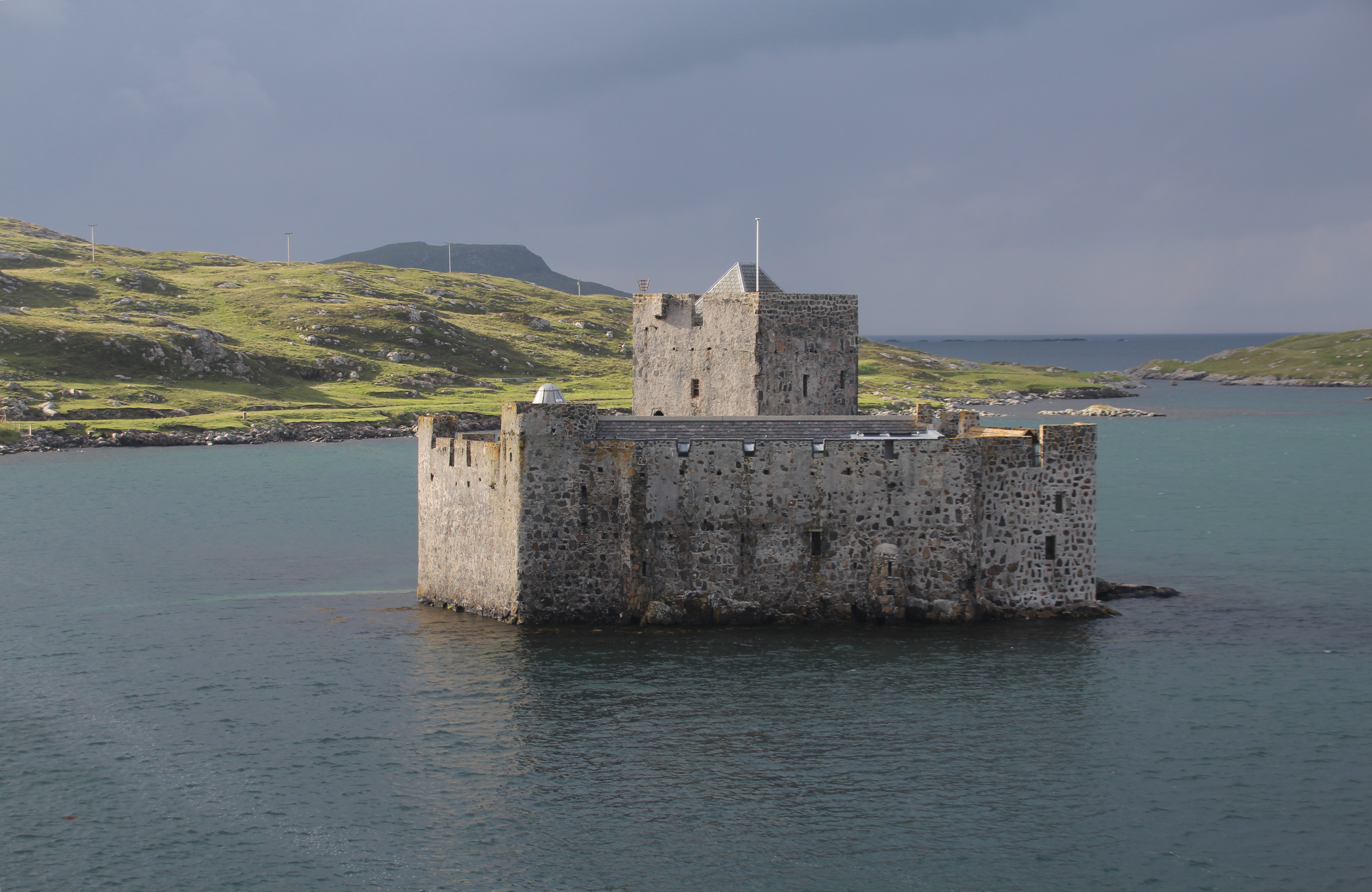 Blick von der auslaufenden Fähre auf Kisimul Castle vor Castlebay, Barra, Äußere Hebriden, Schottland